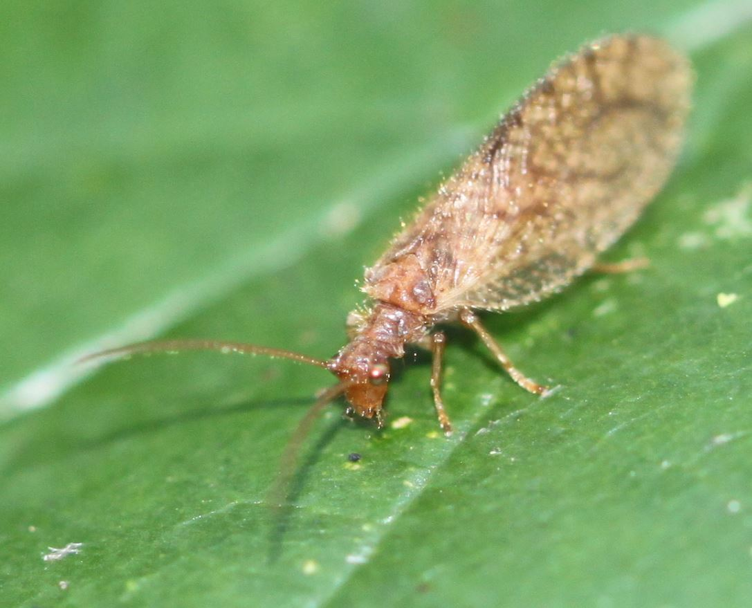 Taghafte der Art Micromus angulatus am 28.9.2016 in der Schwetzinger Hardt